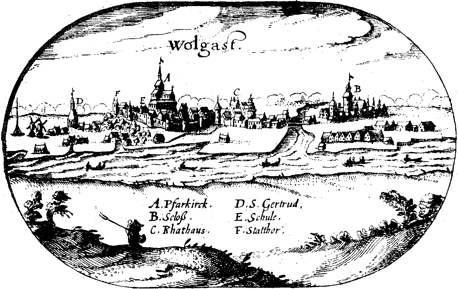 Ansicht von Wolgast (zwischen 1614 und 1617)